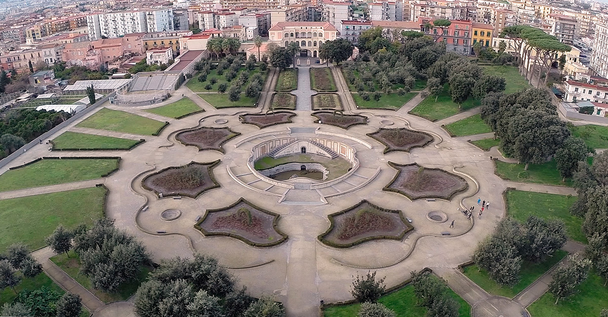 Vista dall'alto di Villa Vannucchi